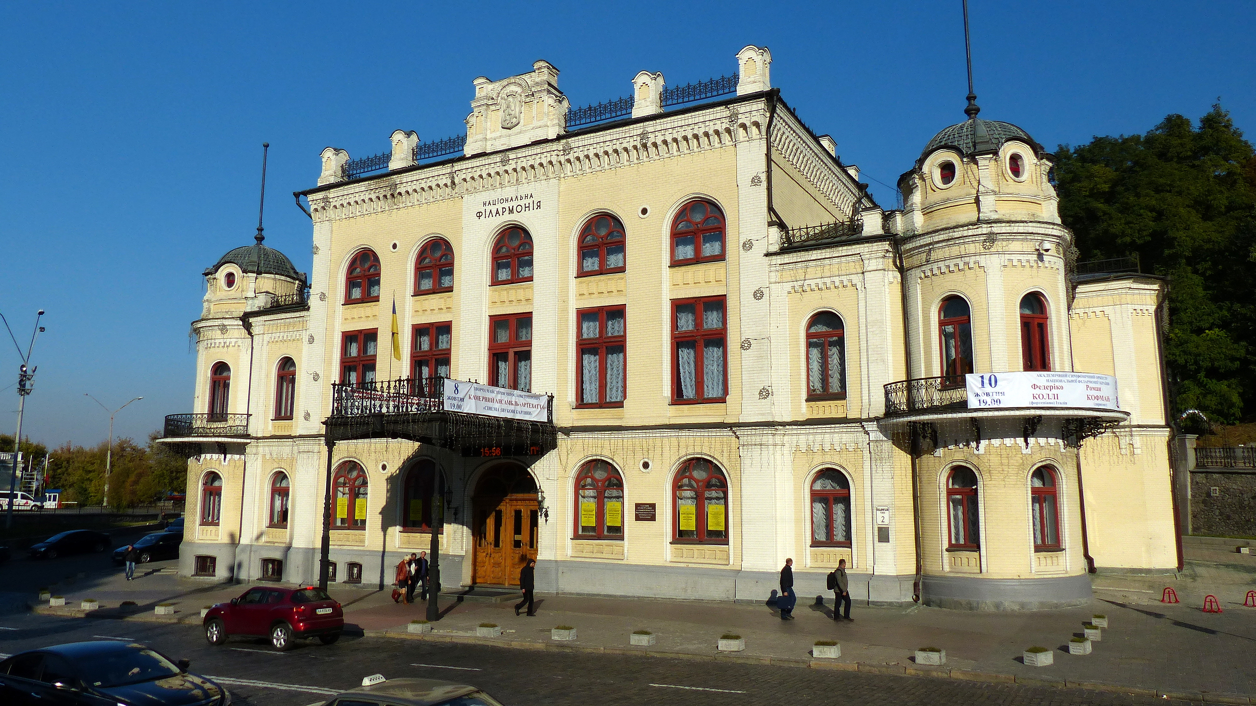 Будинок Купецького зібрання (нині — Національна філармонія), Київ, Володимирський узвіз, 2